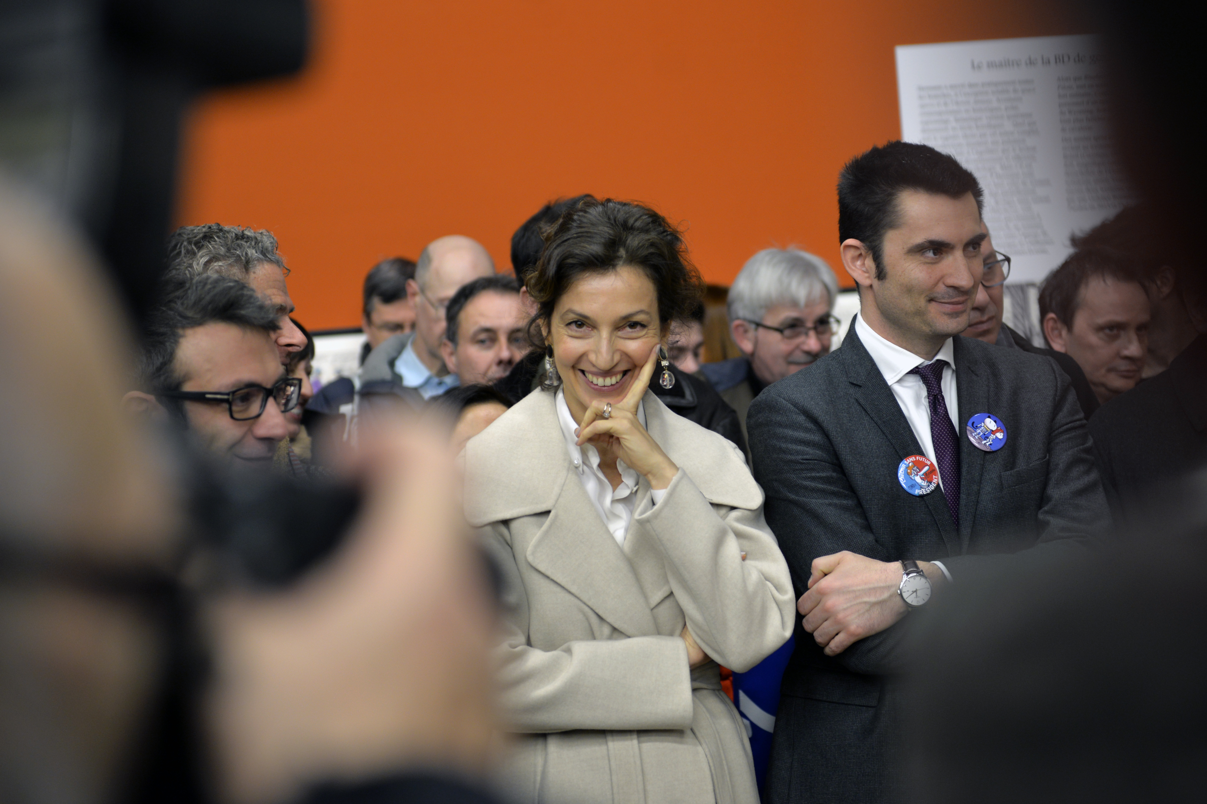 Inauguration officielle de l'exposition Hermann avec la ministre de la Culture Audrey Azoulay, Festival International de la Bande Dessinée d'Angoulême 2017.